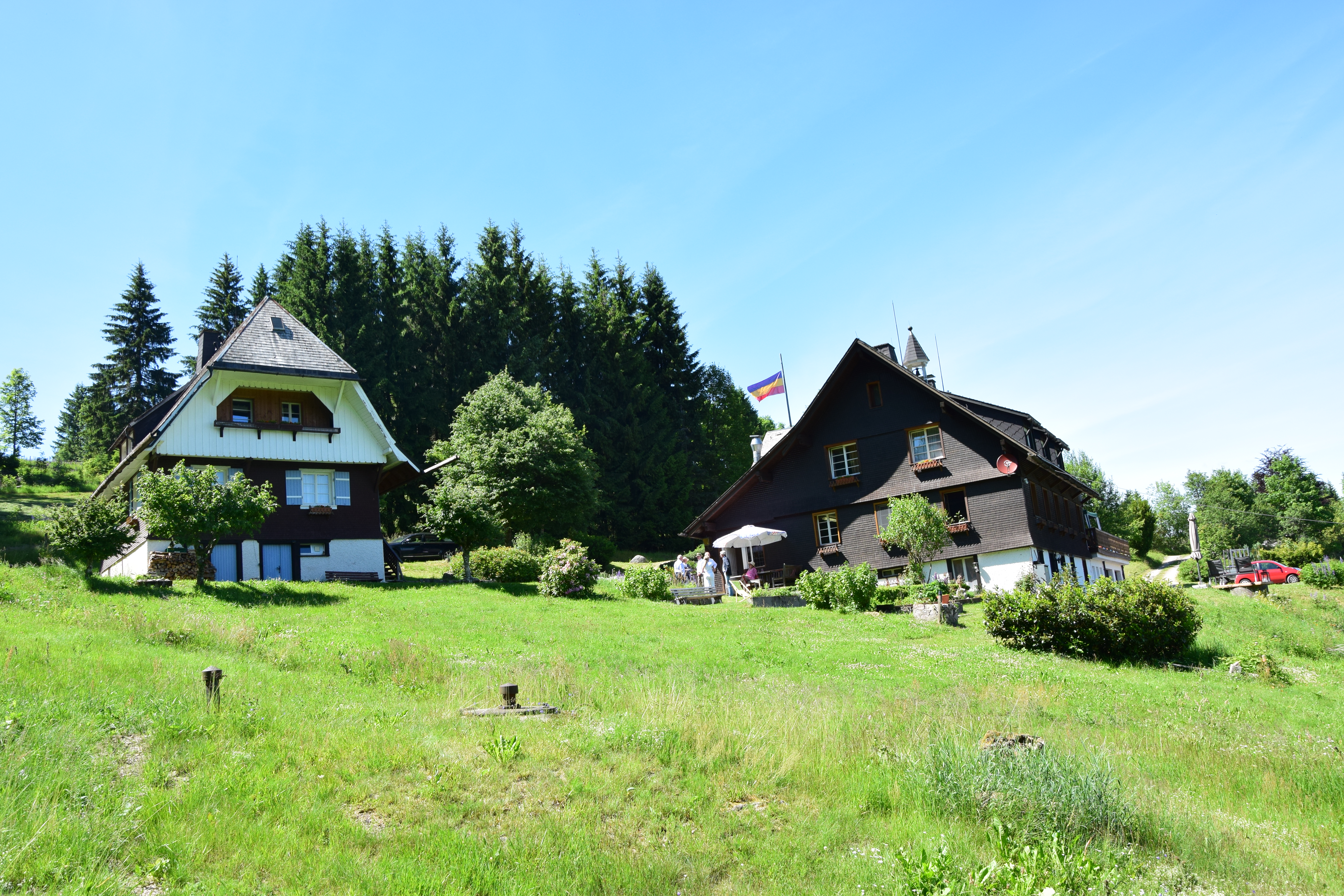 Berghaus der Freiburger Hercynen in Feldberg Bärental